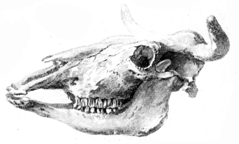 Schädel vom Hausrind